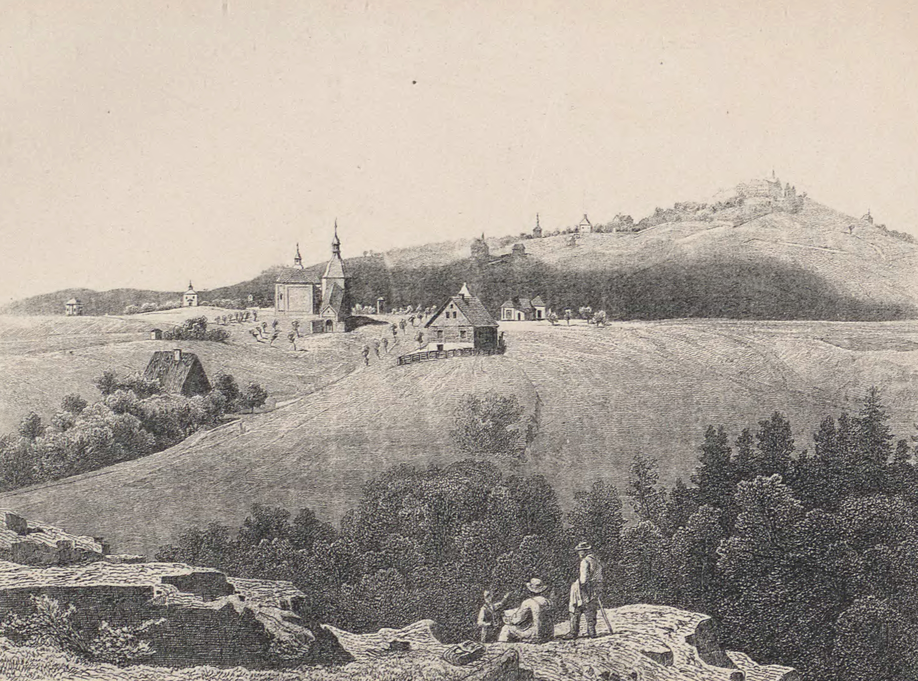 Der Annaberg in Oberschlesien im 19. Jahrhundert. Zeichnung von Theodor Blätterbauer und Stich von Huber.